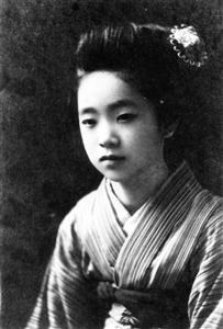 2年後に川端康成と婚約する伊藤初代。1919年。